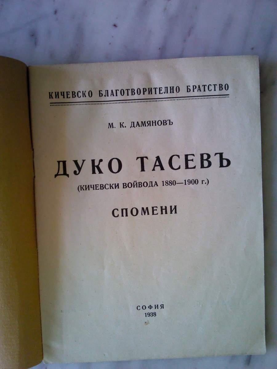 Корица на спомените на Дуко Тасев